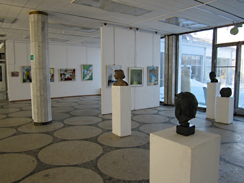 Персональная выставка Евгения Ждана в минском Дворце искусств. 2 - 17 февраля 2011 года.